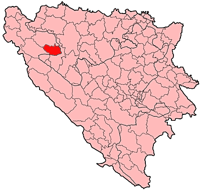 Općina Ključ u Bosni i Hercegovini